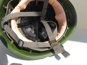 Der 1992 in der Bundeswehr (BW) eingeführte Gefechtshelm. Hier wird die Mitte der 1990er Jahre beim Bundesgrenzschutz (BGS) eingeführte Version gezeigt